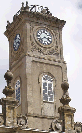 Torre del Reloj del Ayuntamiento de Lugo